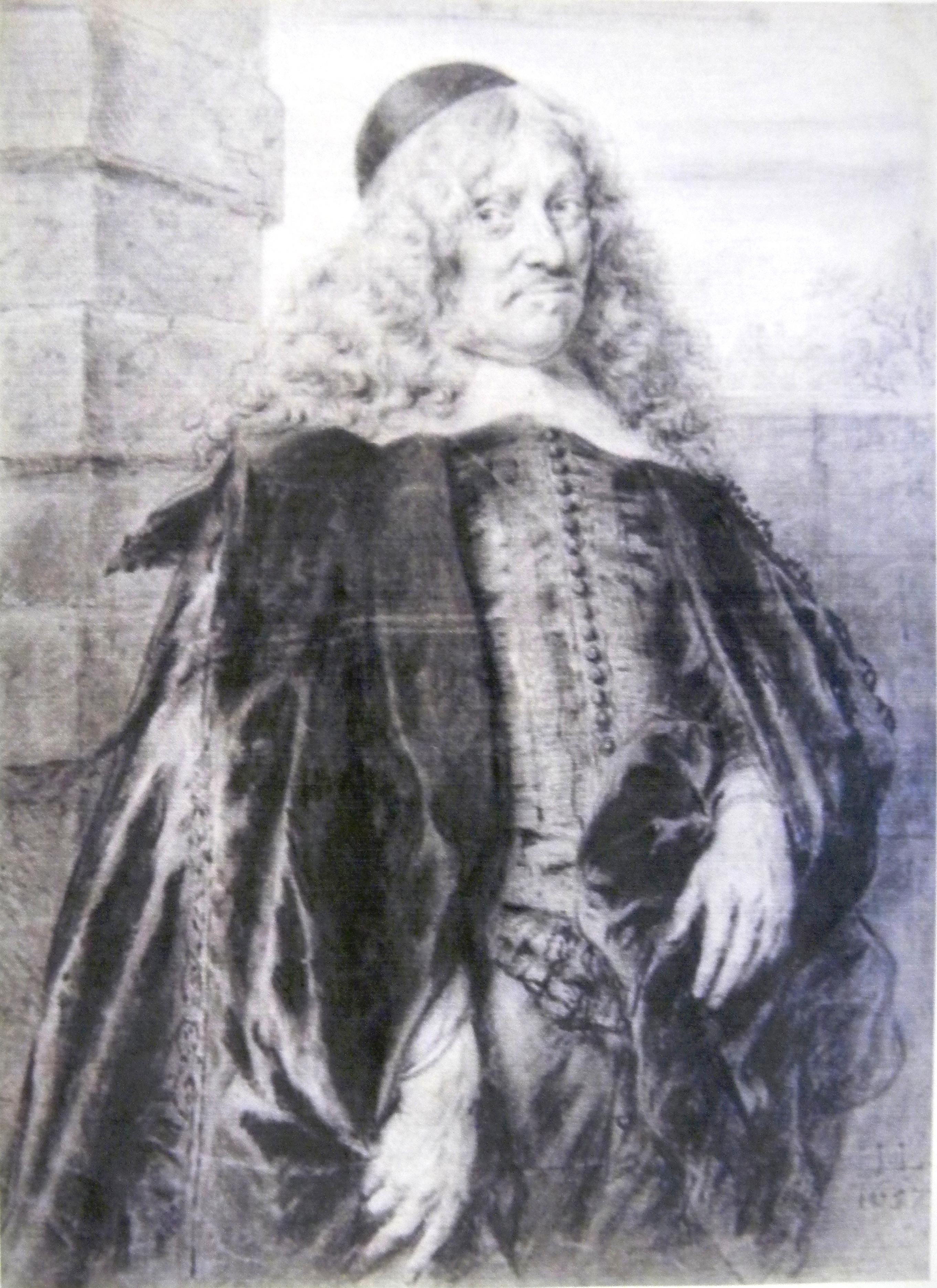 Andries de Graeff (1611-1678)